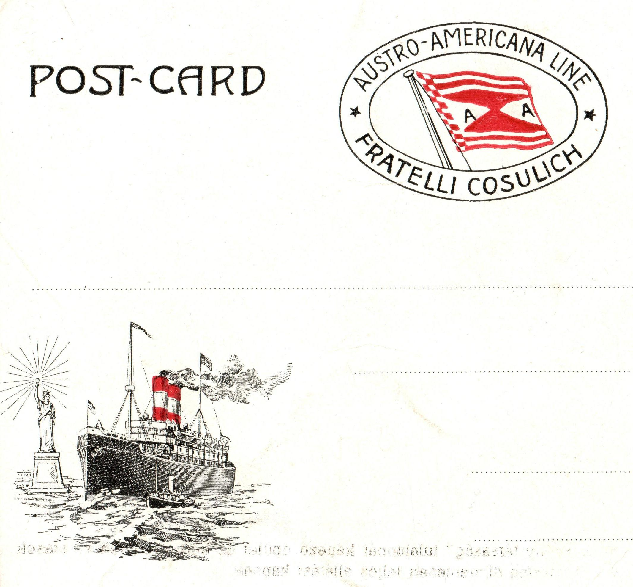 Freiheitsstatue, Dampfschiff, Flagge